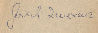 Signature of Gerhard Zwerenz